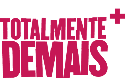 Logotipo da telenovela brasileira Totalmente Demais.